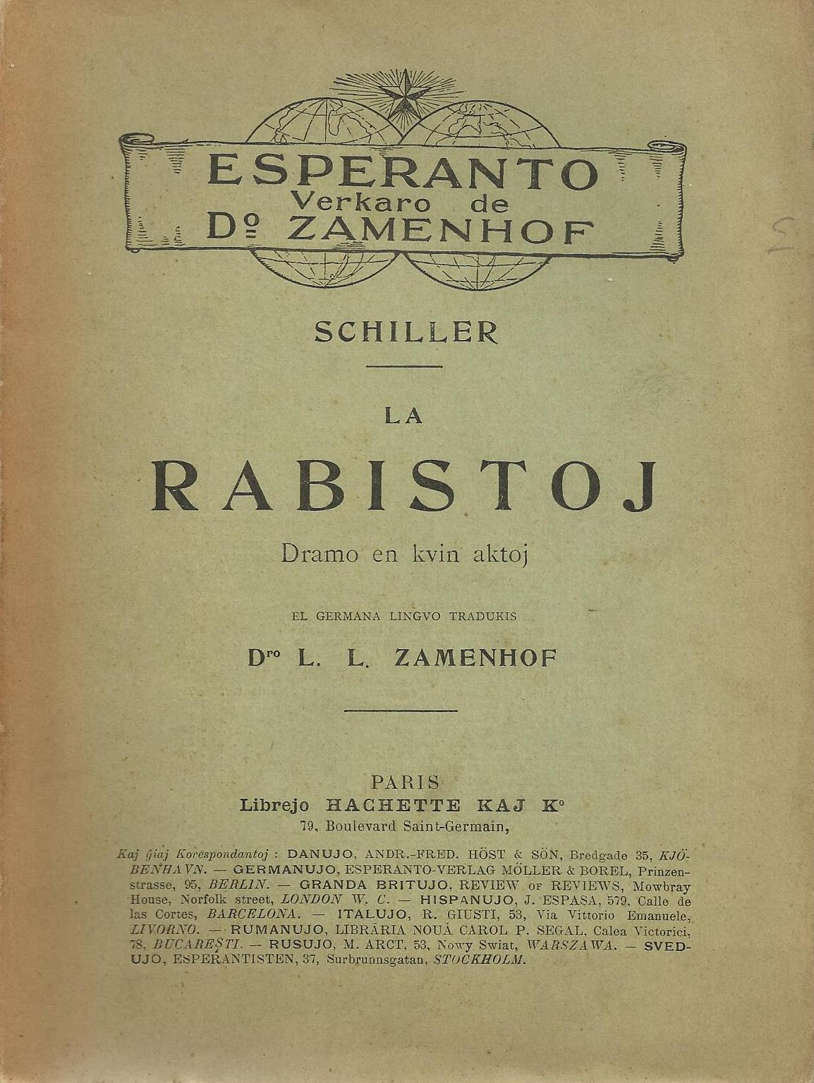 La Rabistoj (kovrilpagxo)